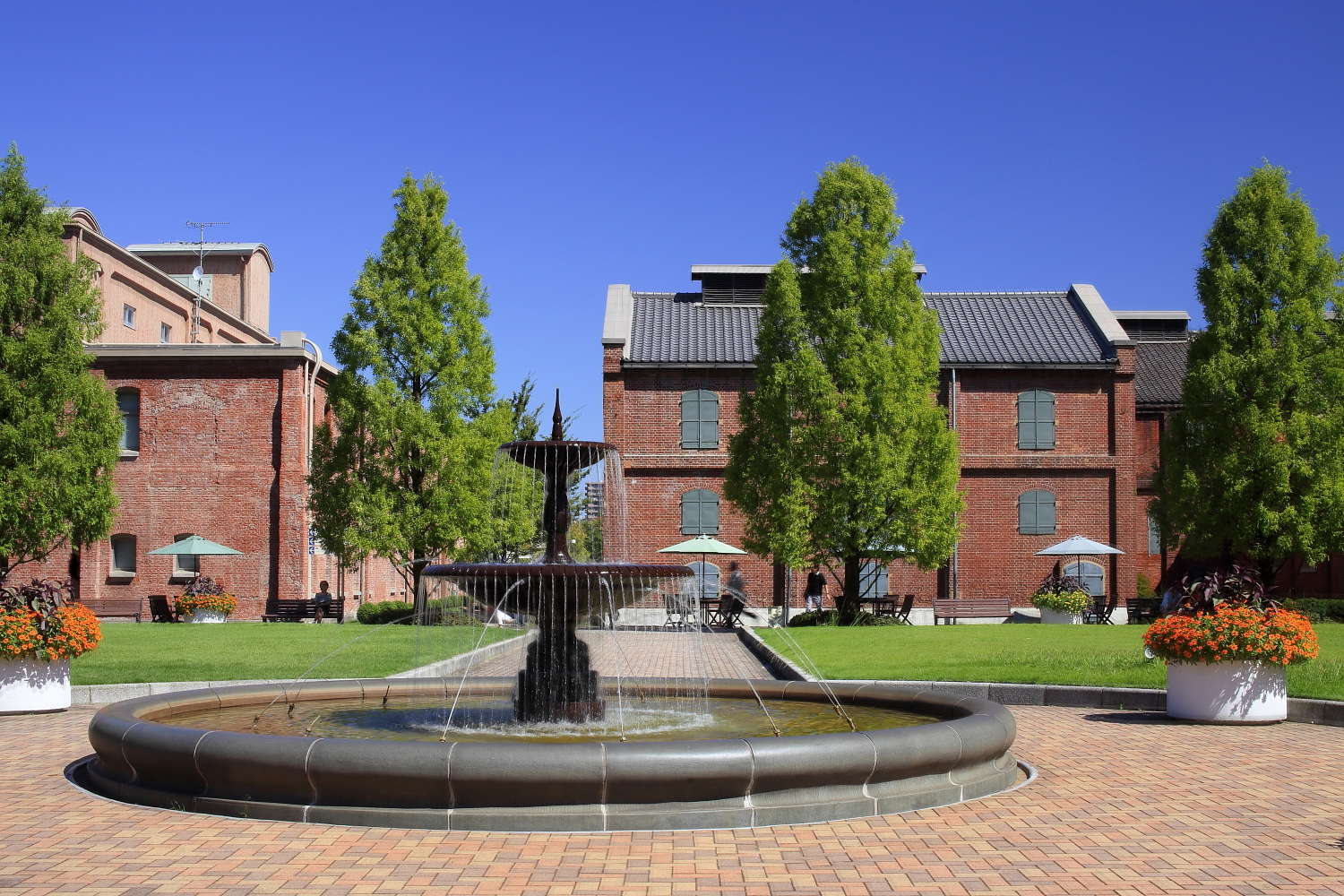 ノリタケの森（名古屋市西区、2014年（平成26年）9月）